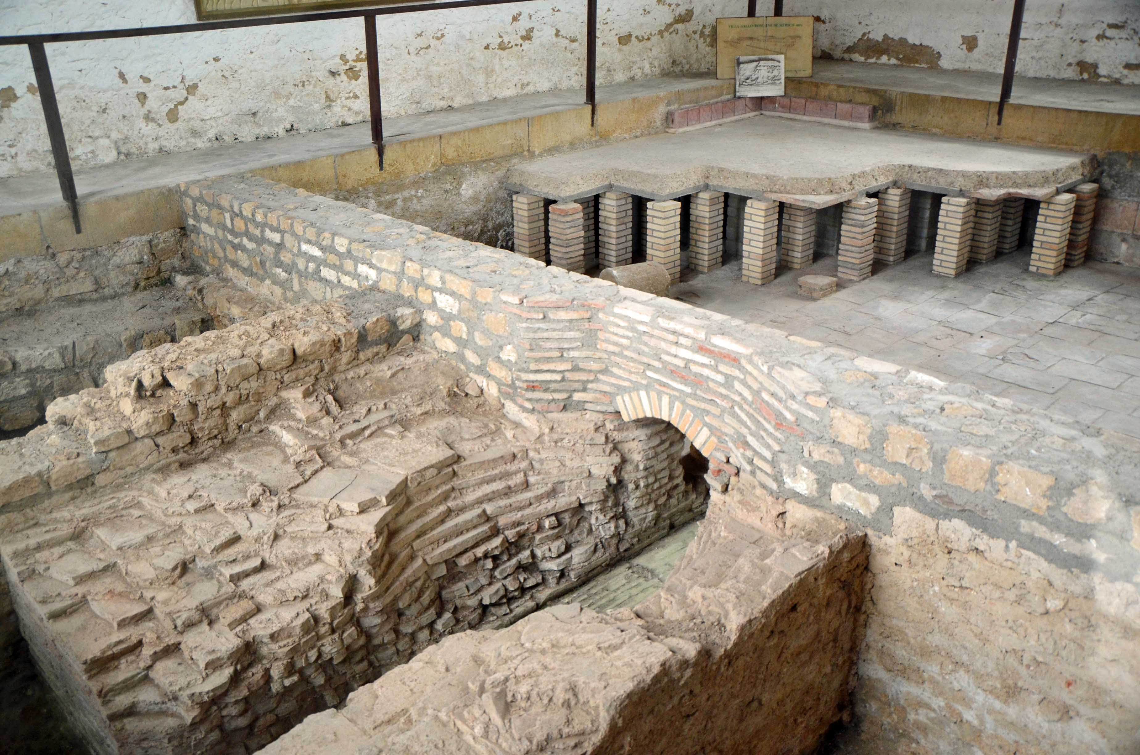 Villa gallo-romaine, Mersch